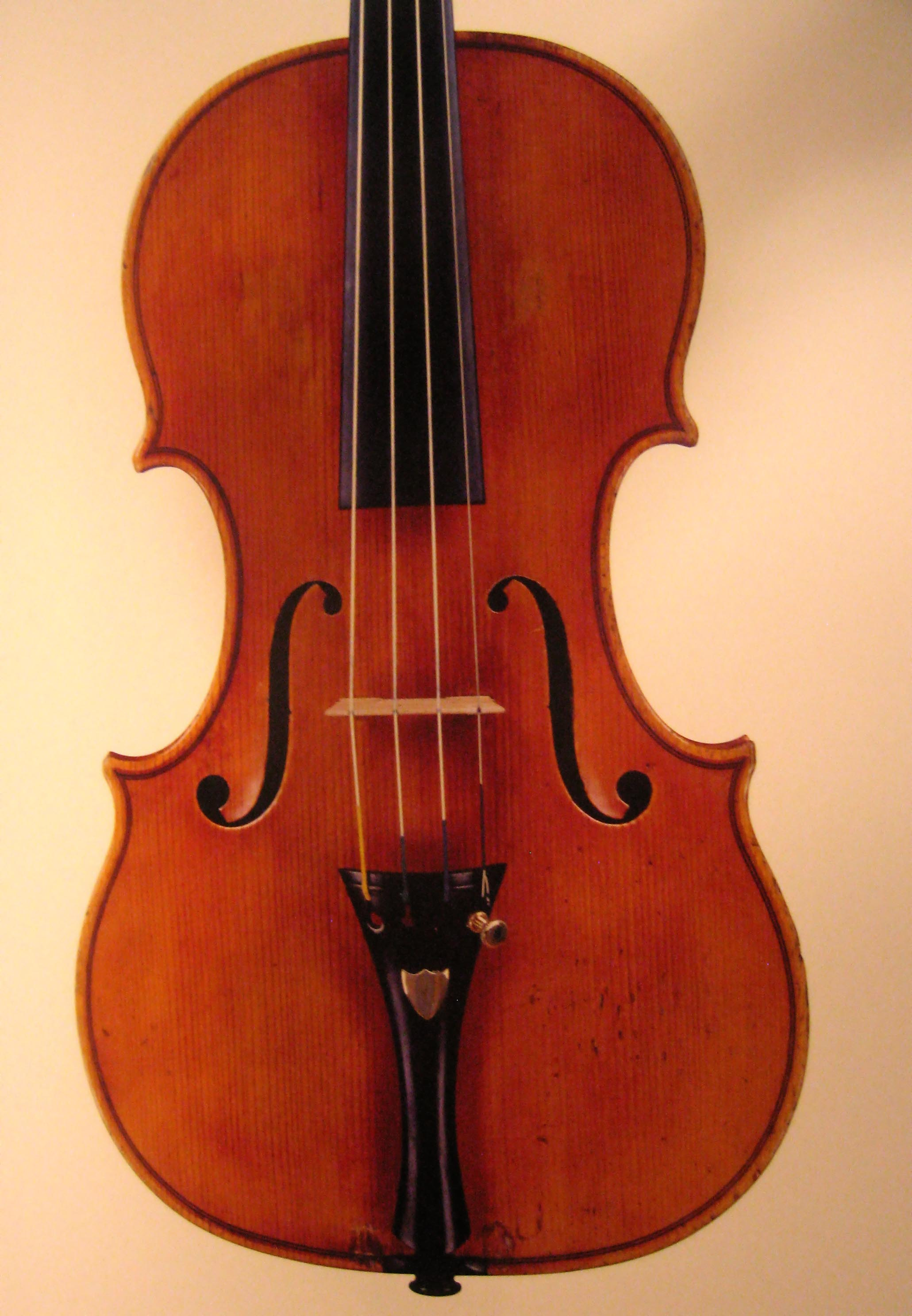 Igino Sderci violin top 1924